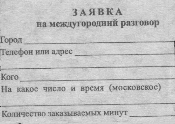 Заявка на междугородний разговор